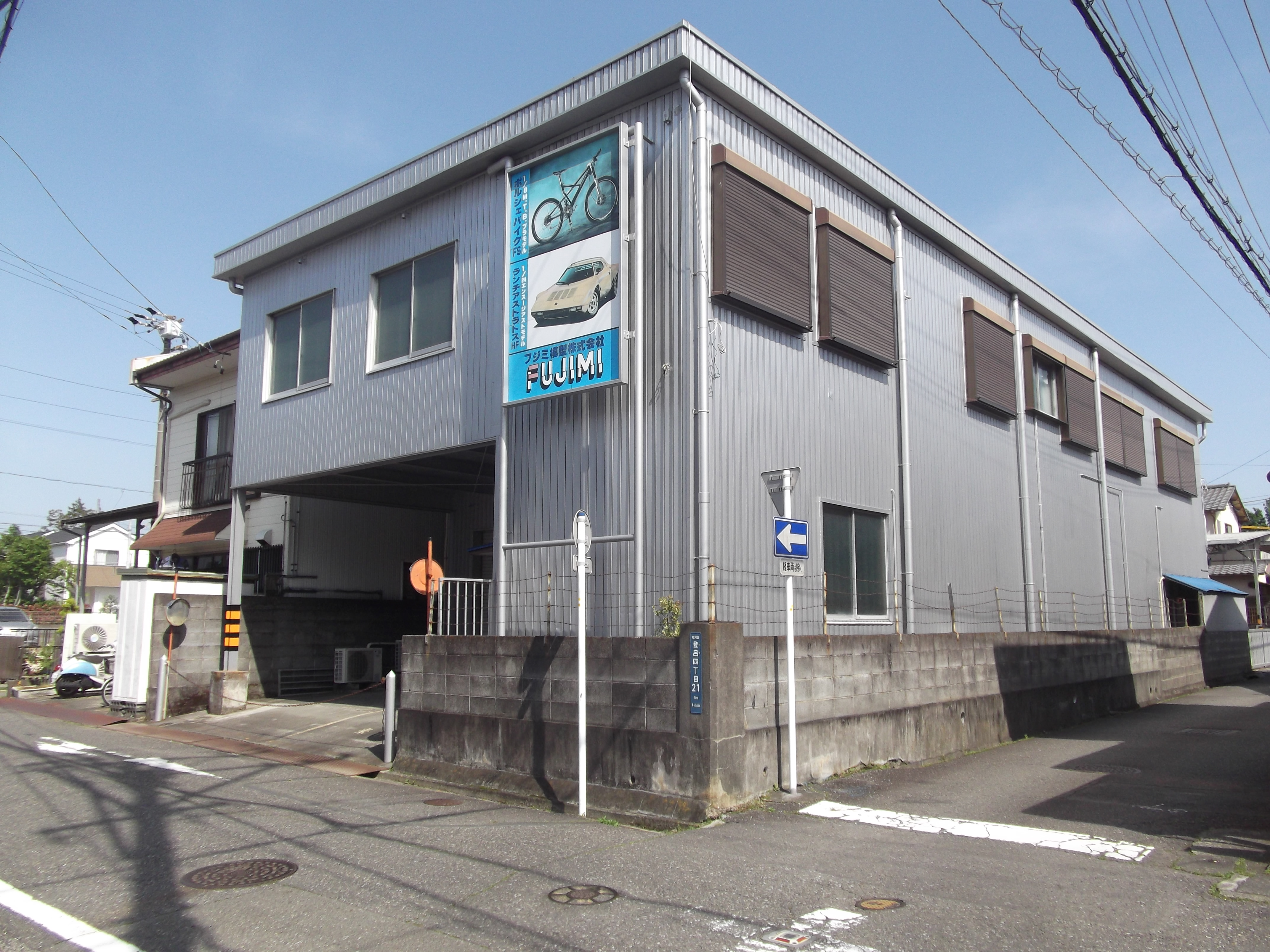 フジミ模型本社屋。静岡市駿河区登呂。